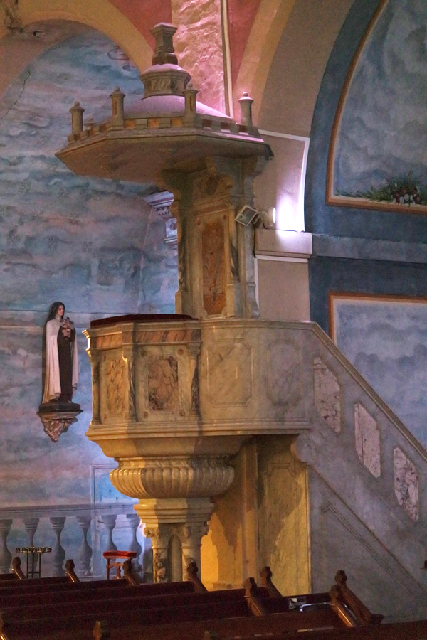 Chaire